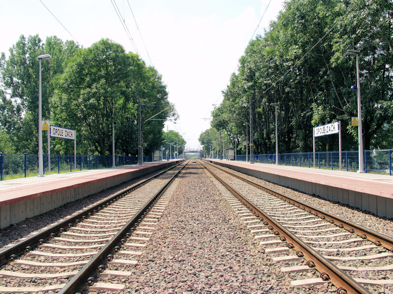 Zmodernizowana stacja kolejowa Opole Zachodnie